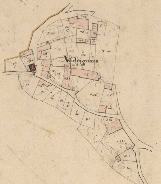 Vedrinyans, de Sallagosa, en el Cadastre Napoleònic del 1812 (Arxius Departamentals dels Pirineus Orientals)